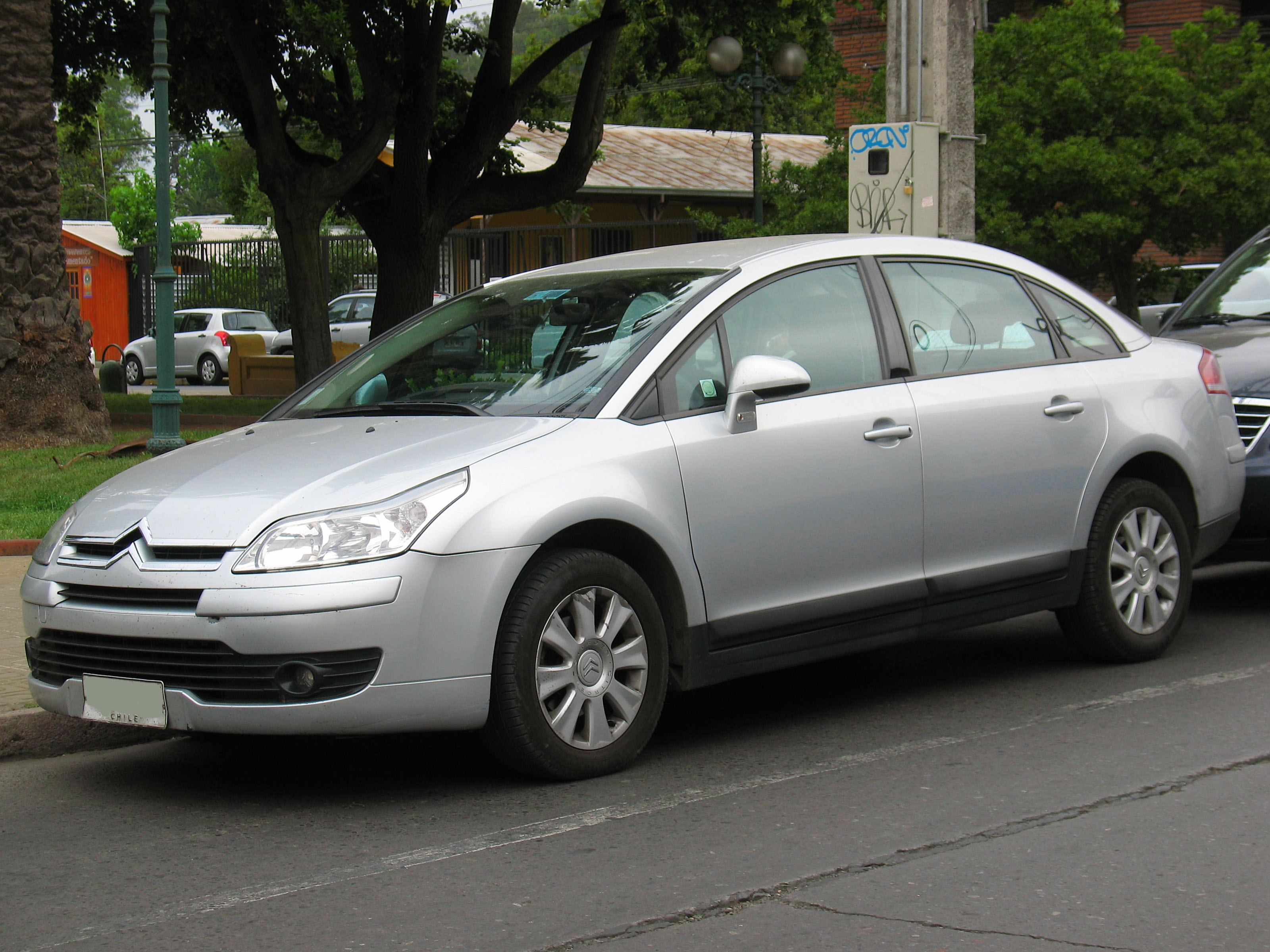 Citroen C4 1.6 HDi Sedan 2008